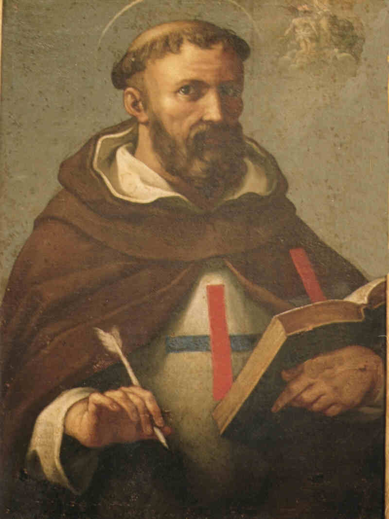 Jean de Matha, fondateur de l'Ordre des Trinitaires